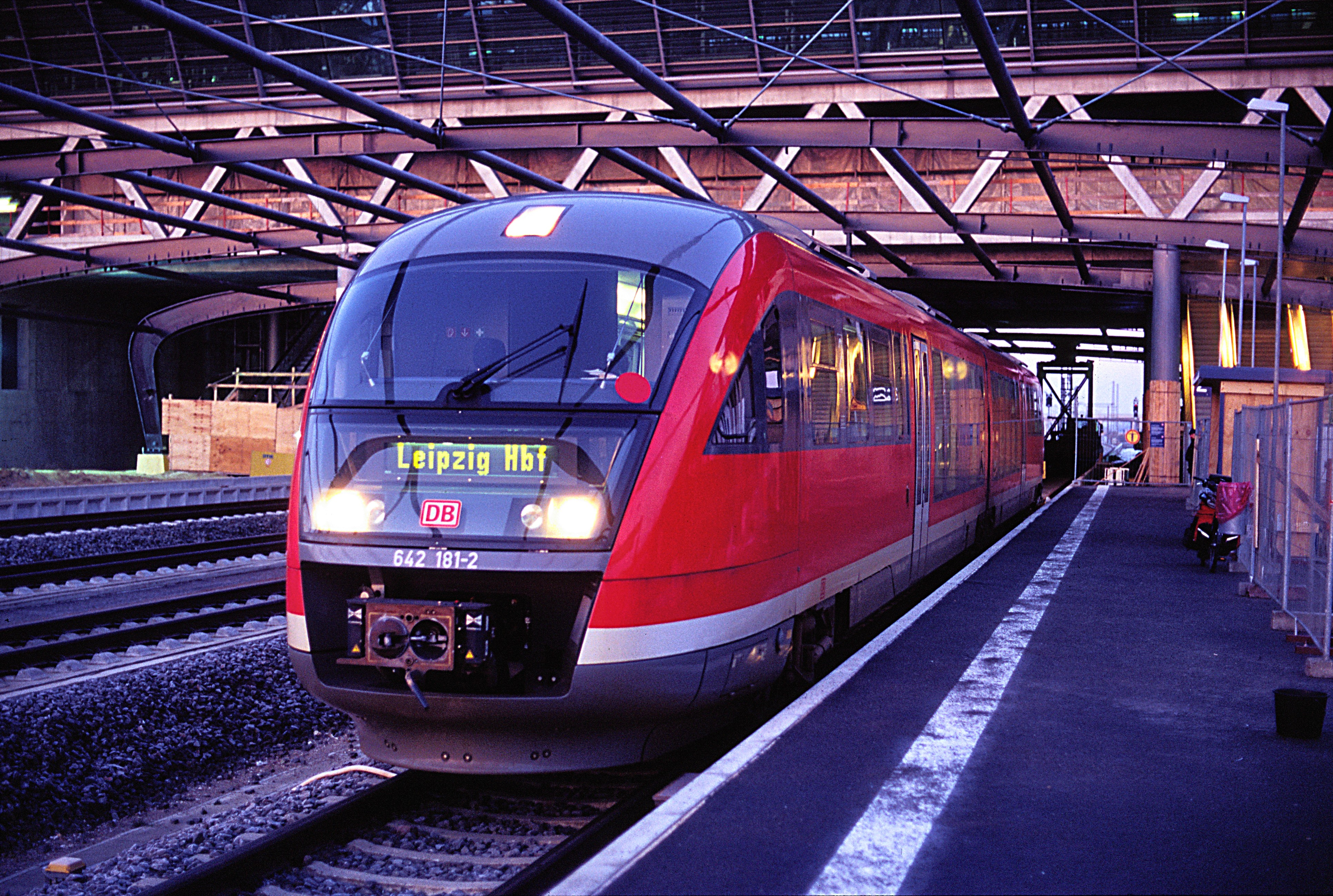 Personenzug Leipzig Hbf–Leipzig/Halle Flughafen und zurück beim Wendehalt im gerade so nutzbaren Flughafenbanhof. Die Anbindung an das Eisenbahnnetz kommt, für den mitteldeutschen Raum nach 1990 mit der außerordentlich autozentrierten Verkehrspolitik allerdings typisch, mit gegenüber den neugebauten Straßenverbindungen mehreren Jahren Verzögerungen deutlich zu spät. Taxiunternehmen und die Flughafenbringedienste sind begeistert.Der Bahnsteig ist nur auf einer Triebwagenlänge nutzbar, allerdings reicht das für den spärlichen Bedarf auch aus.